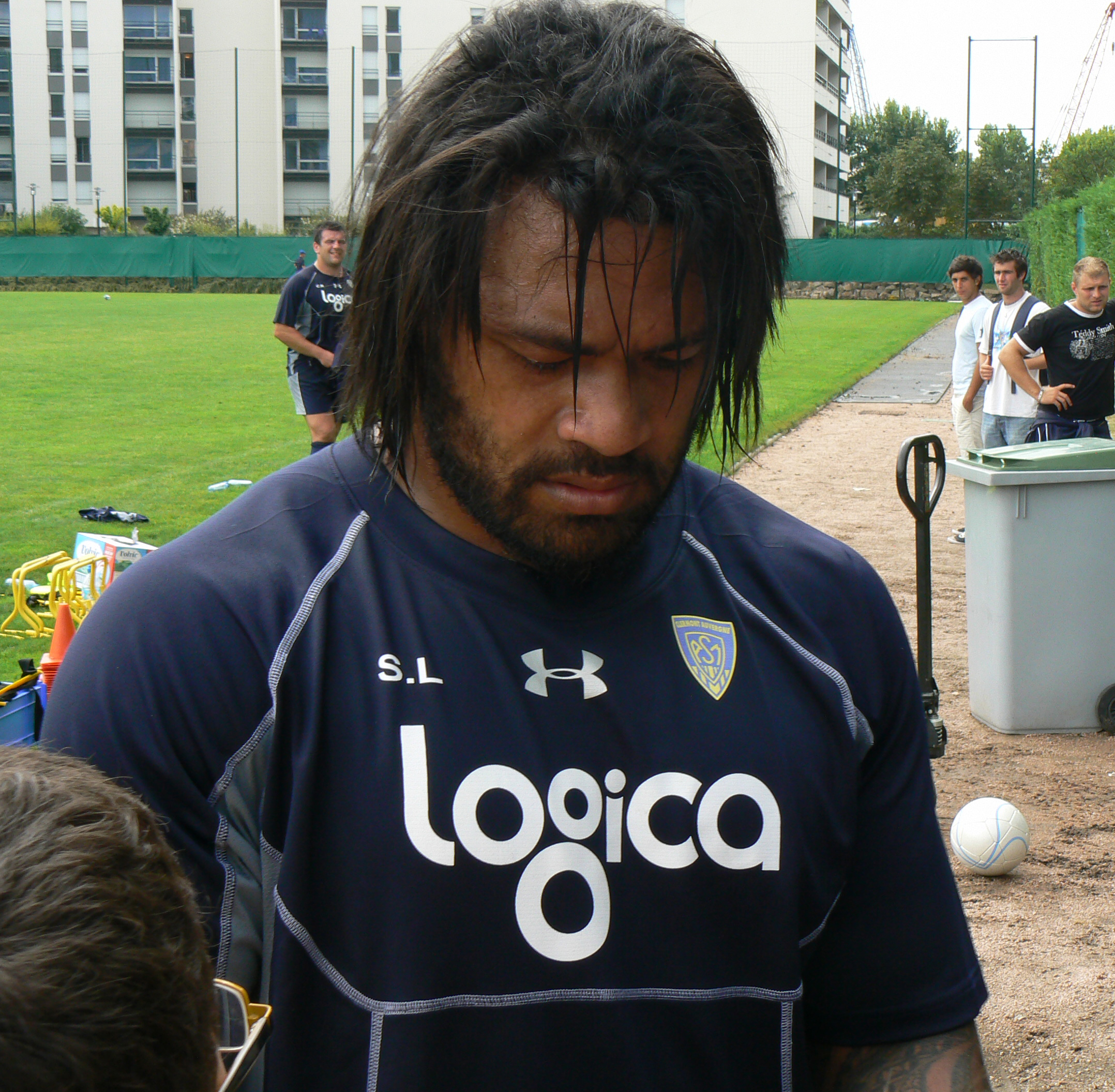 Le rugbyman néo-zélandais Sione Lauaki lors d'une entrainement avec l'ASM Clermont Auvergne.